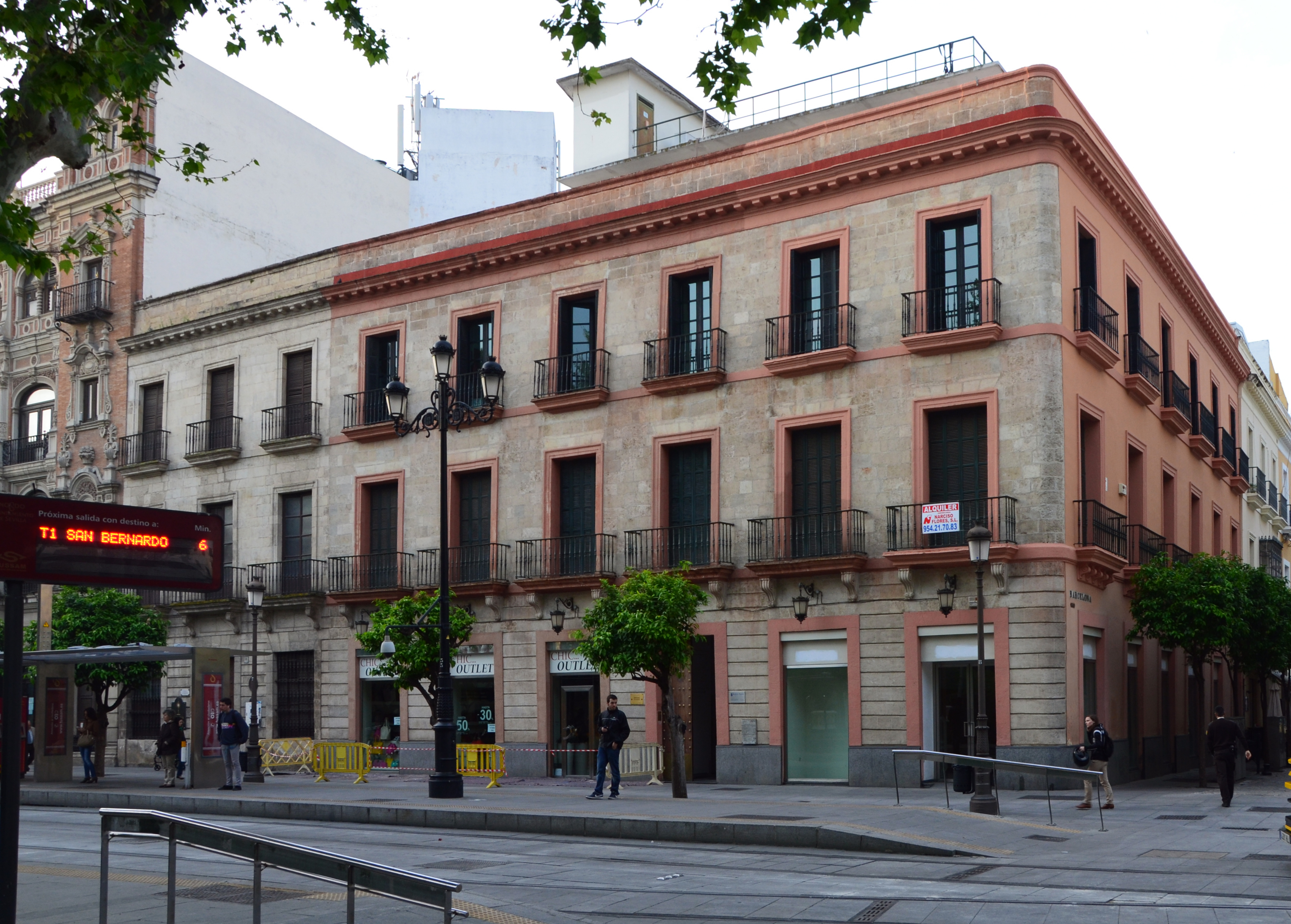 Le seul bâtiment de la Plaza Nueva de Séville (Espagne) existant sous sa forme d'origine, datant du XIXe siècle. Il est situé entre le bâtiment de Telefónica et la rue Barcelona.